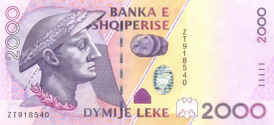 2000 lek